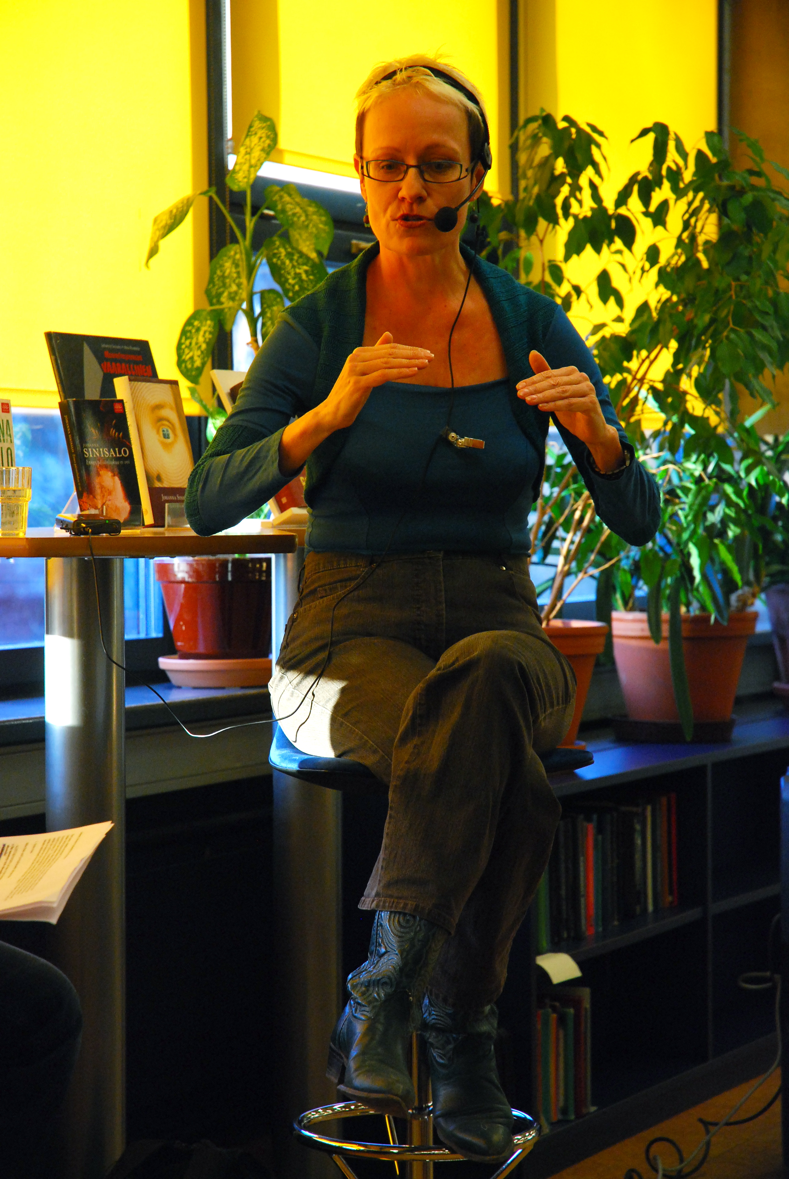 Sinisalo, Johanna vierailemassa Helsingin Suomalaisessa Yhteiskoulussa